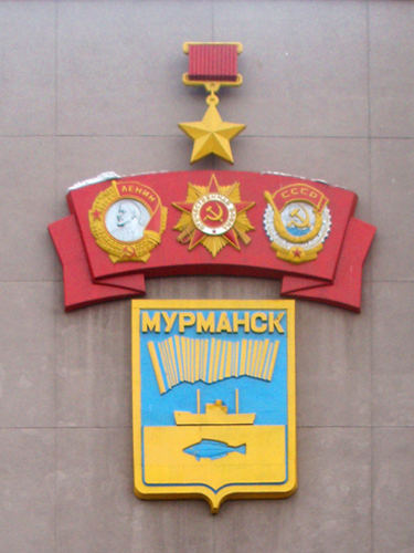 Правительственные награды Мурманска на одном из зданий на площади Пяти Углов